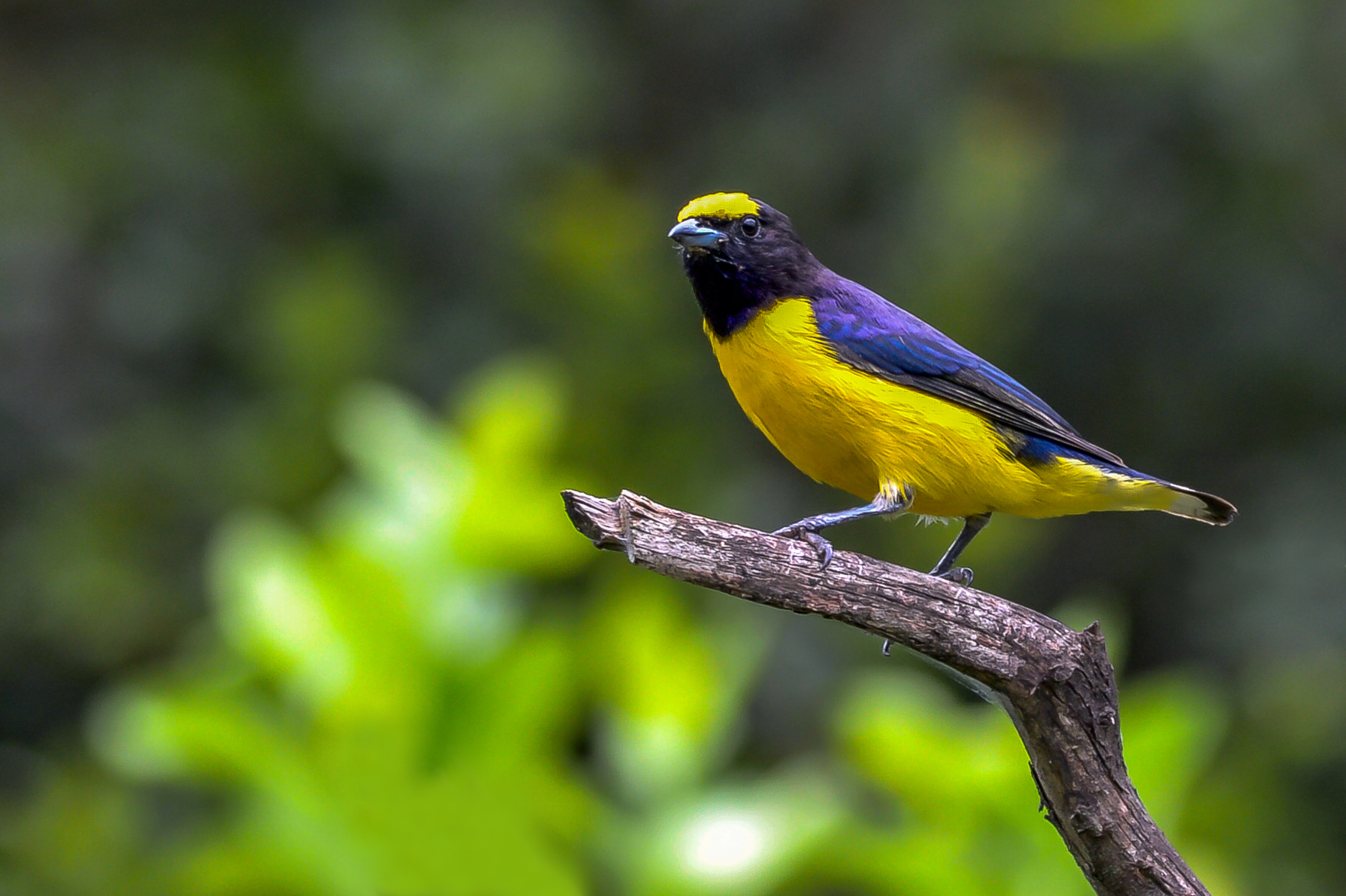 nome em inglês Purple-throated Euphonia, macho, foto realizada em Arealva/SP.